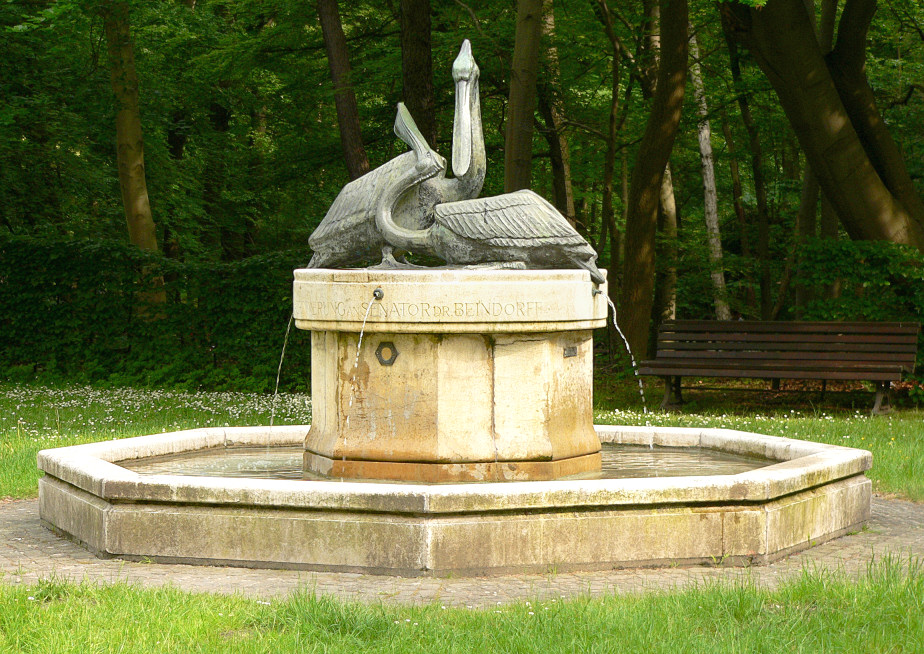 Beindorf Brunnen Hannover